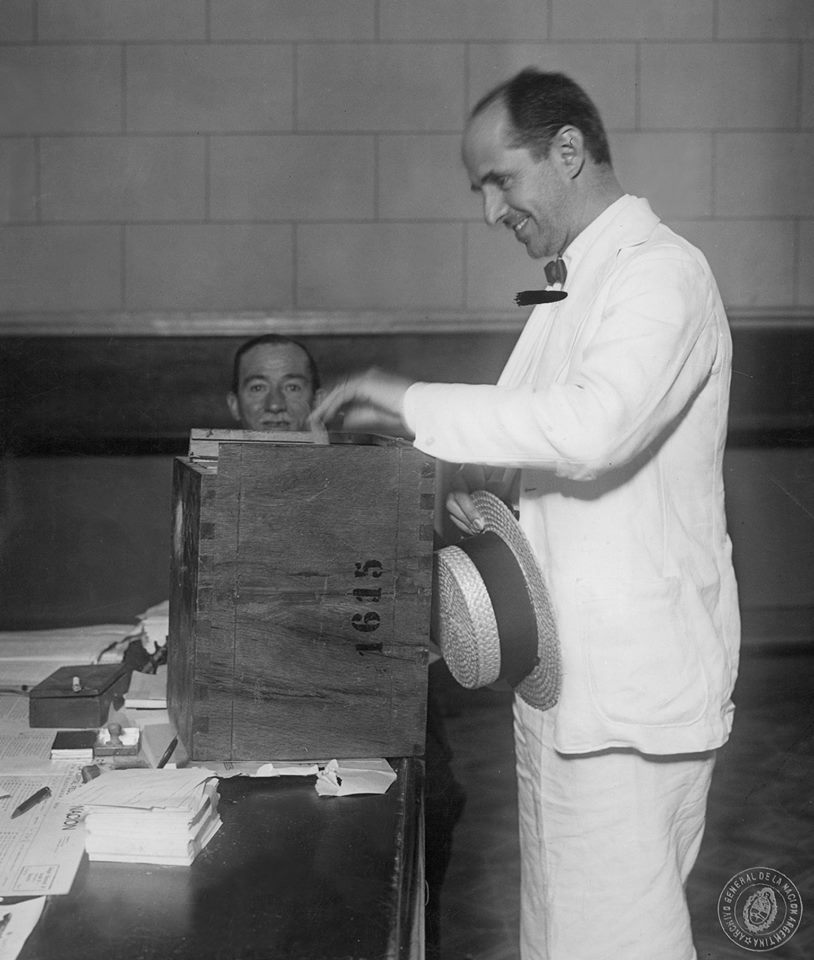 El ministro Federico Pinedo votando, 1934. Documento Fotográfico. Inventario 81065.